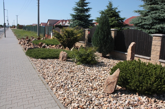 Brno, Troubsko, Ostopovická